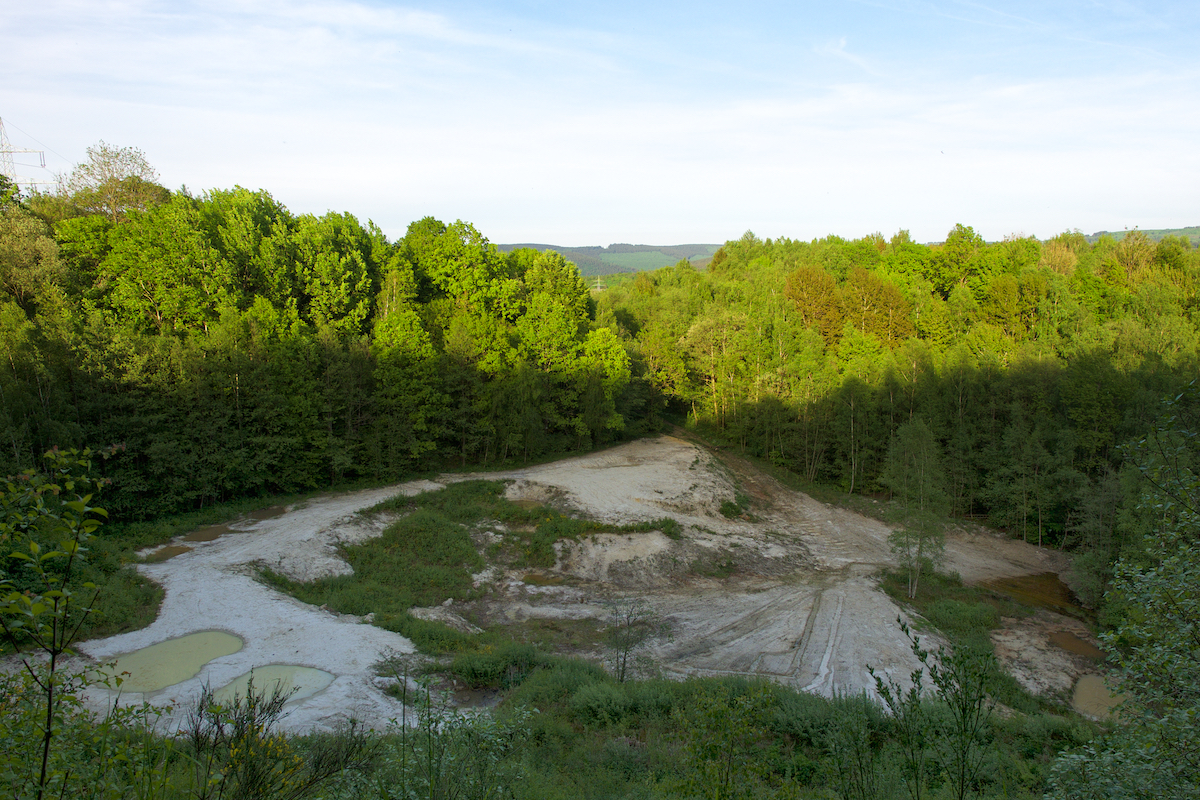 NSG Galgenkopf